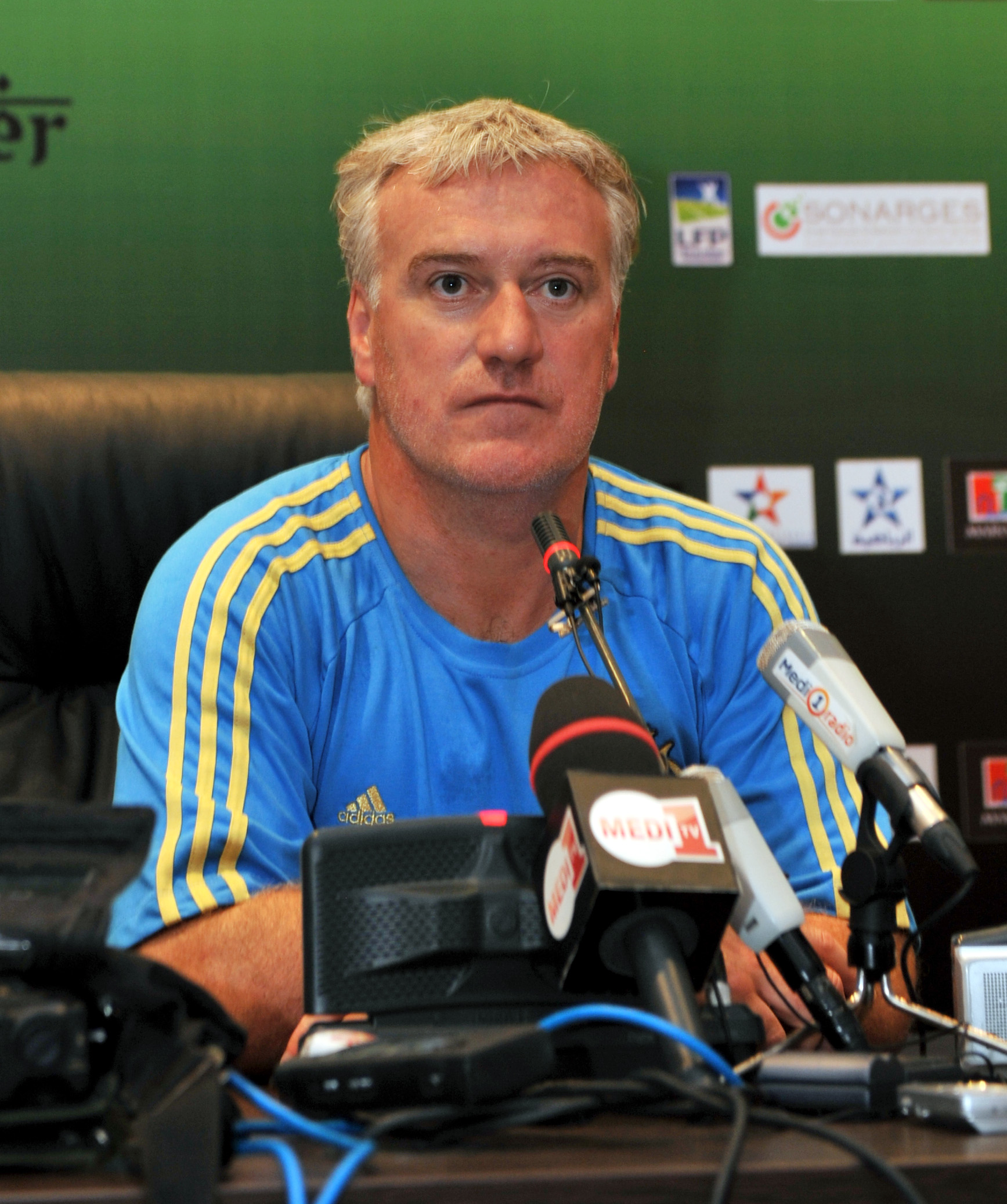 L'entraîneur de l'Olympique de Marseille Didier Deschamps, lors du Trophée des Champions 2011.